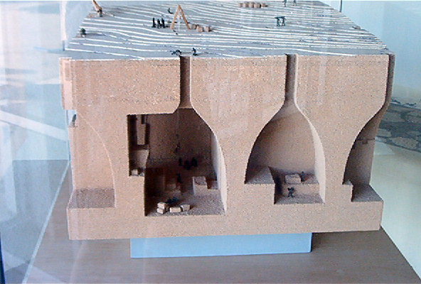 maquette puits extraction El haouaria,antiquarium "quartier magon" de Carthage